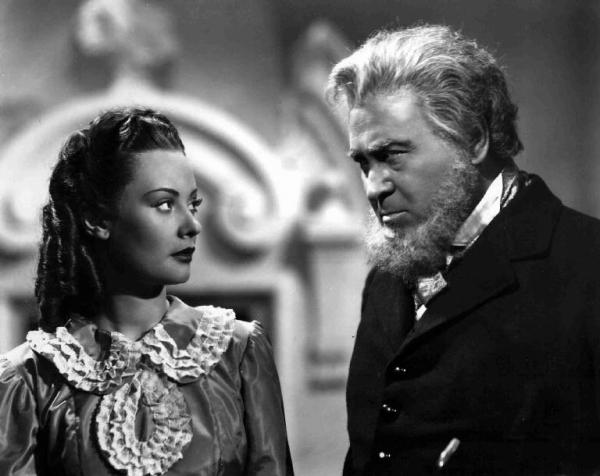 Corinne Luchaire e Camillo Pilotto in una scena del film "Abbandono" diretto da Mario Mattoli (1940)